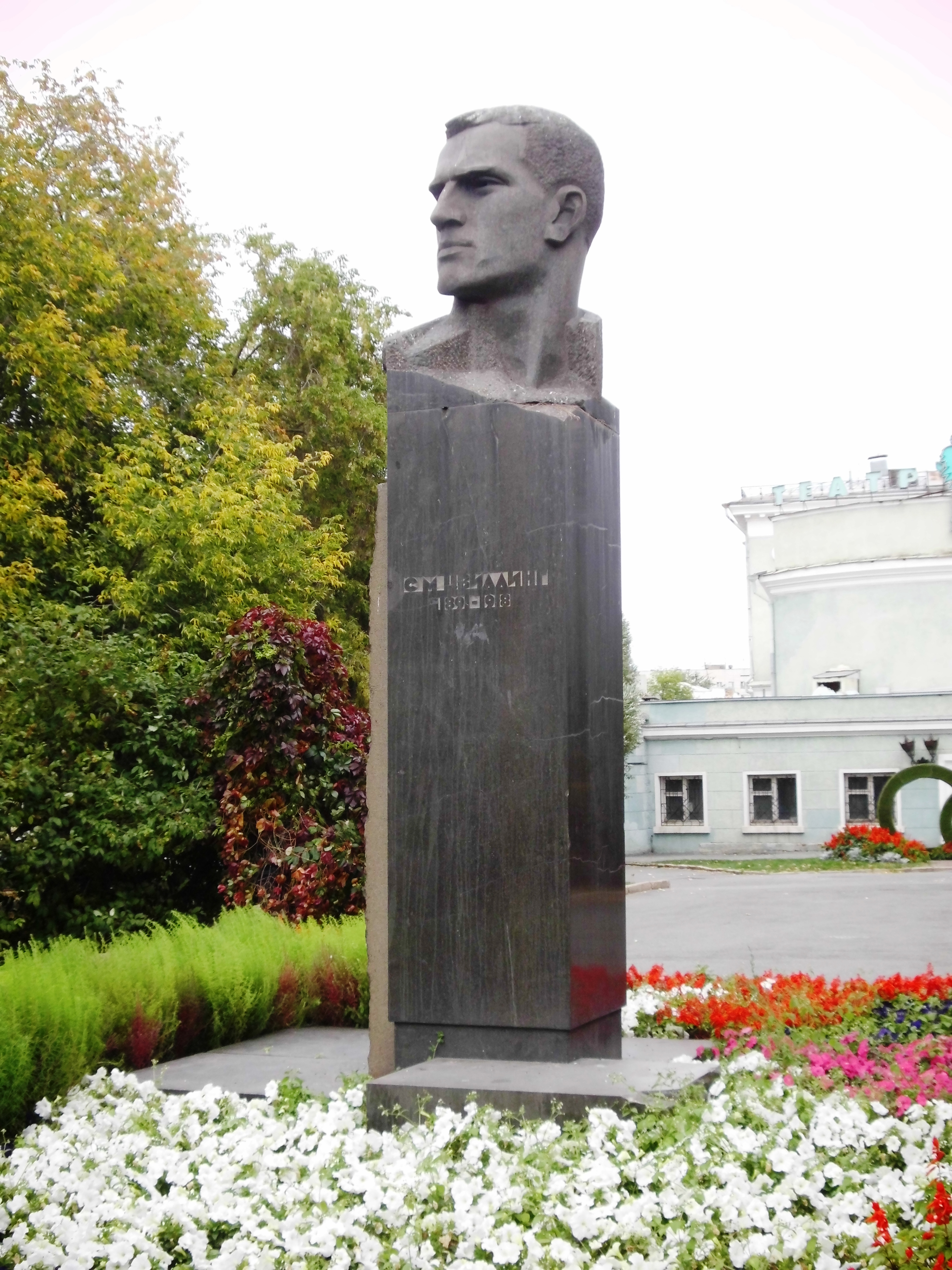 Памятник С. М. Цвиллингу: улица Цвиллинга, 37, 39 / Тимирязева, 28, 29, сквер у кинотеатра им. А. С. Пушкина / театра Манекен, Челябинск, Челябинская область. На заднем плане театр Манекен (к-тр Пушкина).